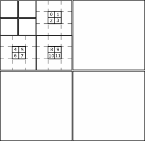 Obrázek k článku JPEG2000 (schema uspořádání subbands)